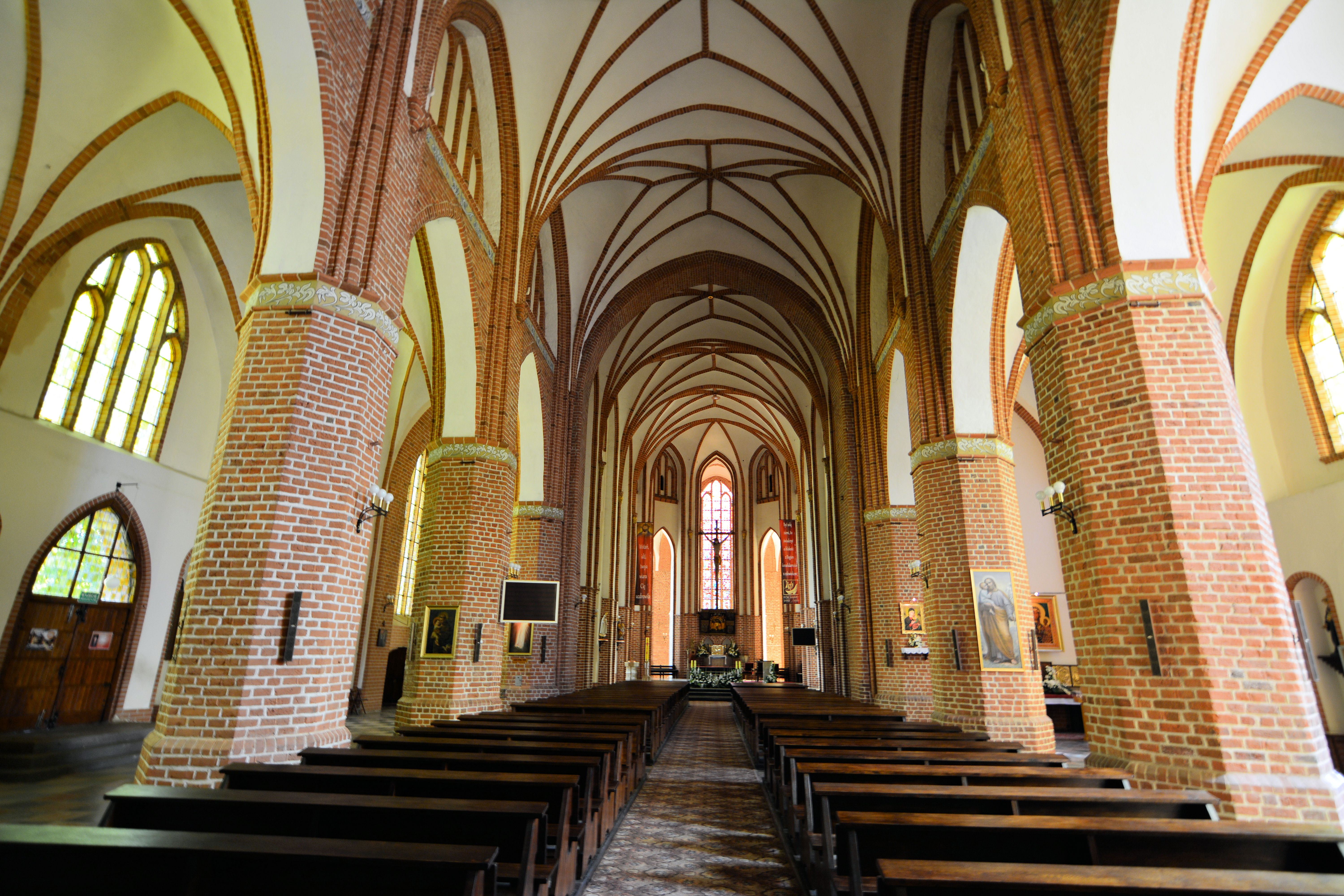 Kościół Wniebowzięcia NMP w Pyrzycach - wnętrze